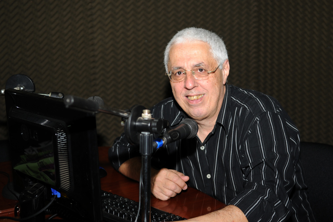 Carlos García Coni, periodista de la Provincia de Misiones, Argentina.